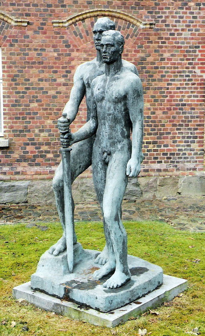 Das Foto zeigt die Plastik von Kolbe. Sie steht in Stralsund auf dem Hofe des Marinemuseums auf dem Dänholm.